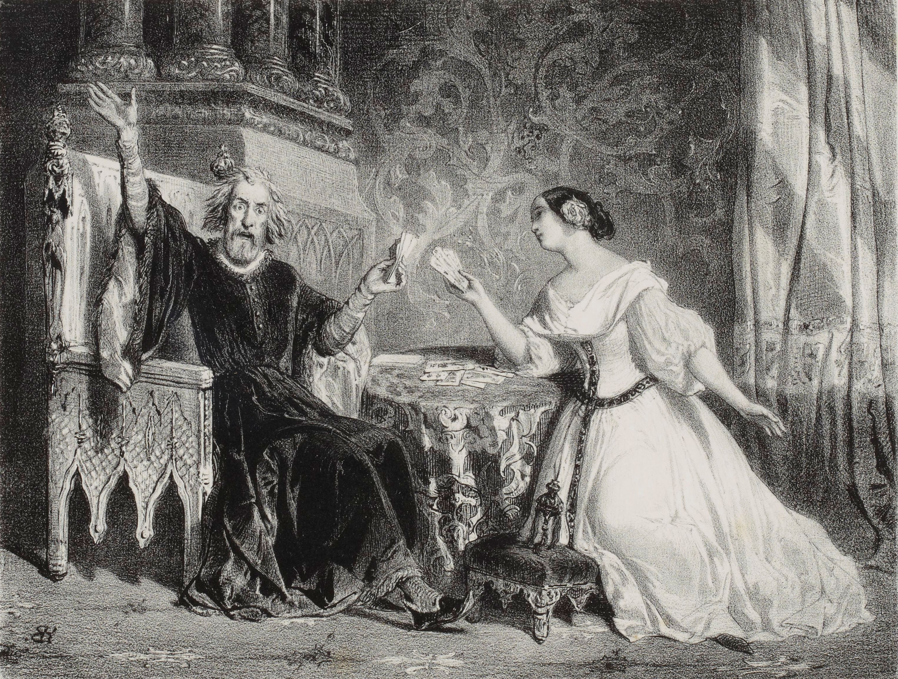 Duo des cartes de l'acte II de Charles VI, opéra de J.F. Halévy, avec R. Stoltz dans le rôle d'Odette et P. Barroilhet dans celui de Charles VI